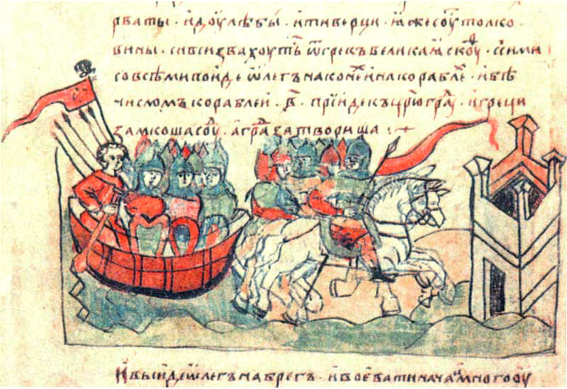 Княжа дружина. Похід Олега на Царгород. Радзивілівський літопис